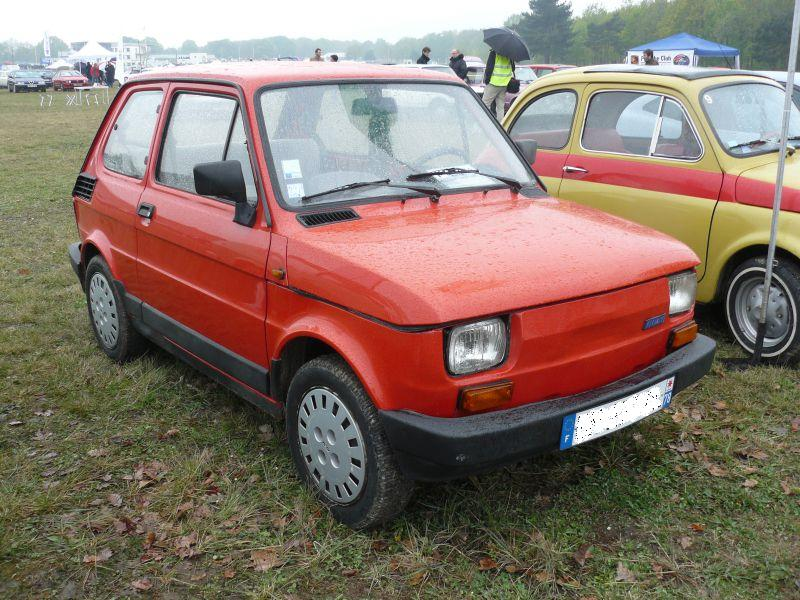 Photo prise à Montlhery en avril 2012